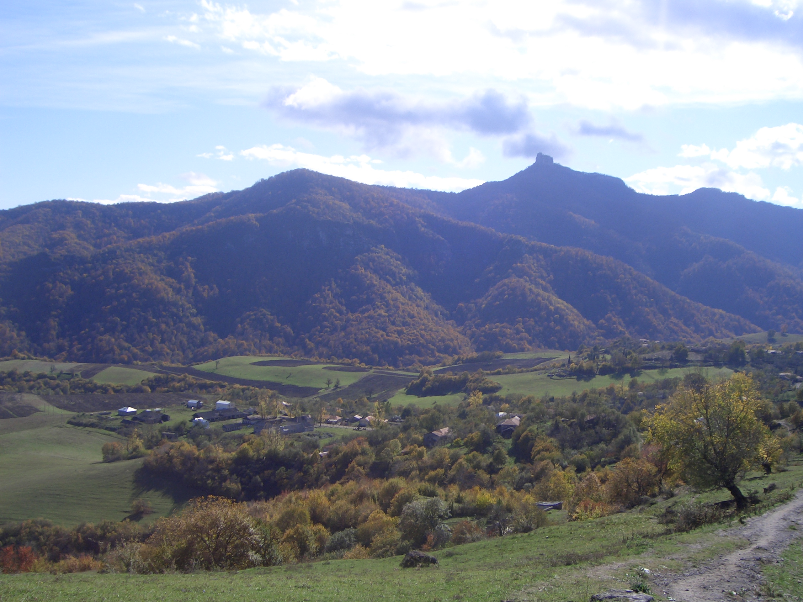 Осенний Колатак, ноябрь 2009г.